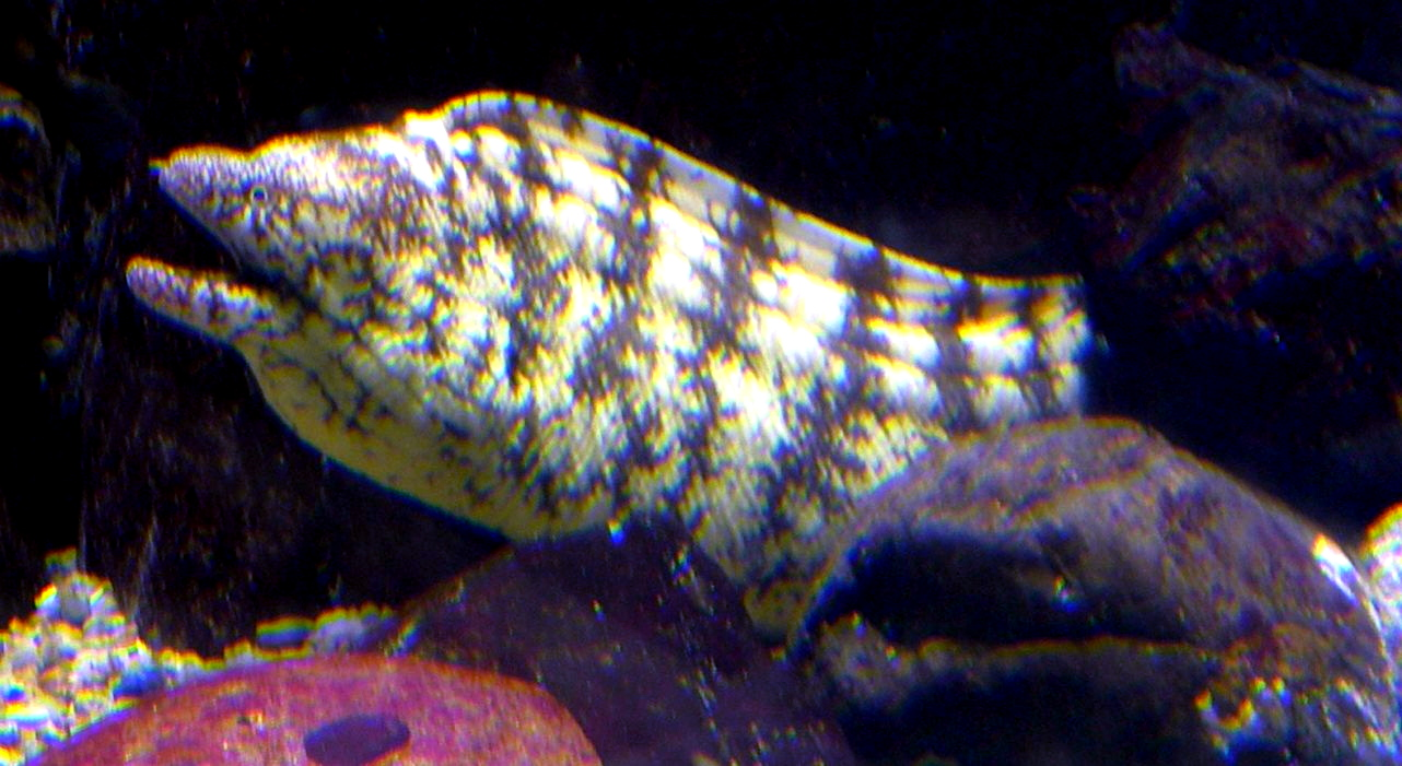 Kidako moray picture I took in the Kaiyuukan (Osaka Aquariam).